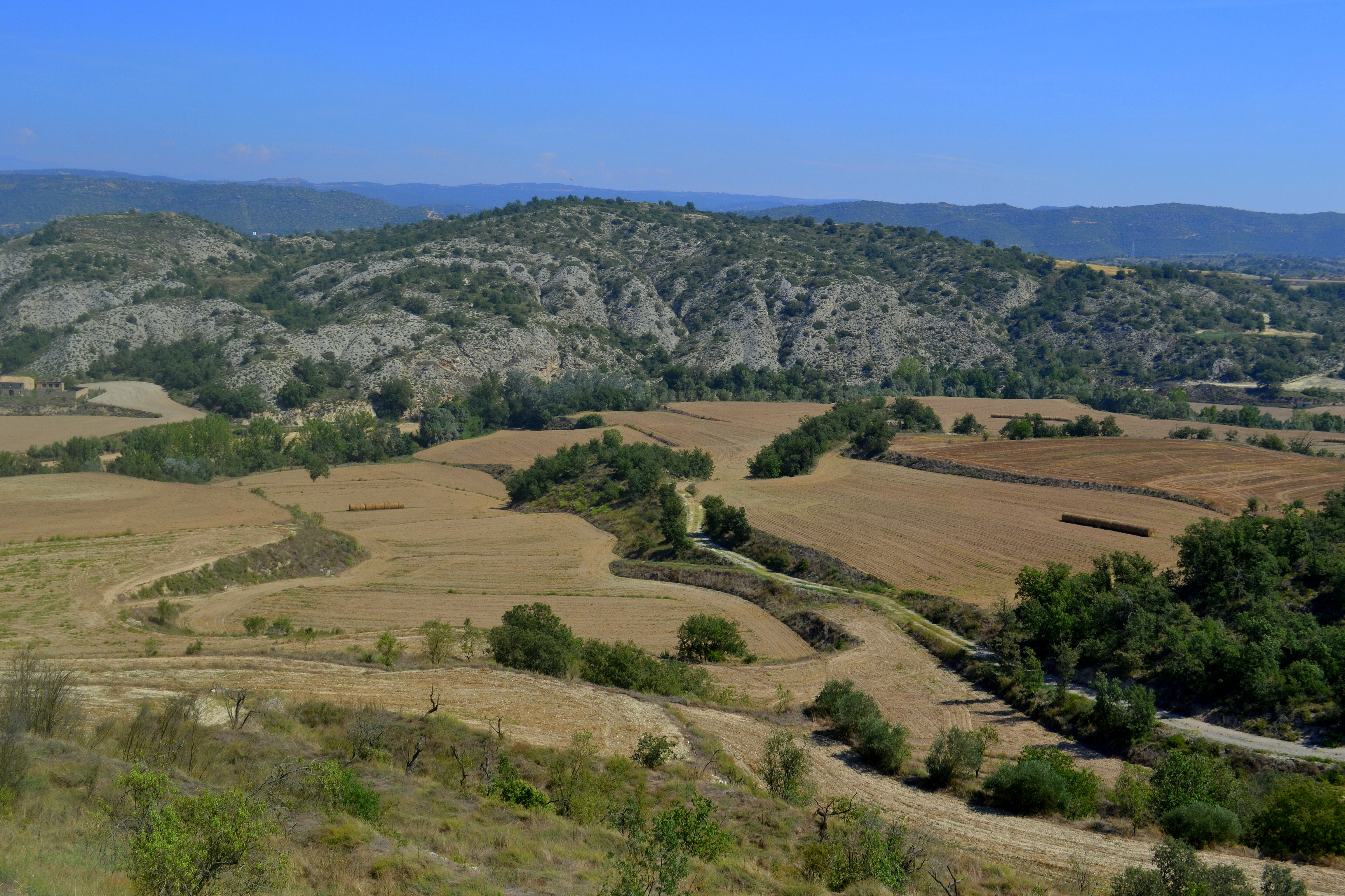 Puig Castellar des de Talteüll This is a a photo of a natural area in Catalonia, Spain, with id: ES510216